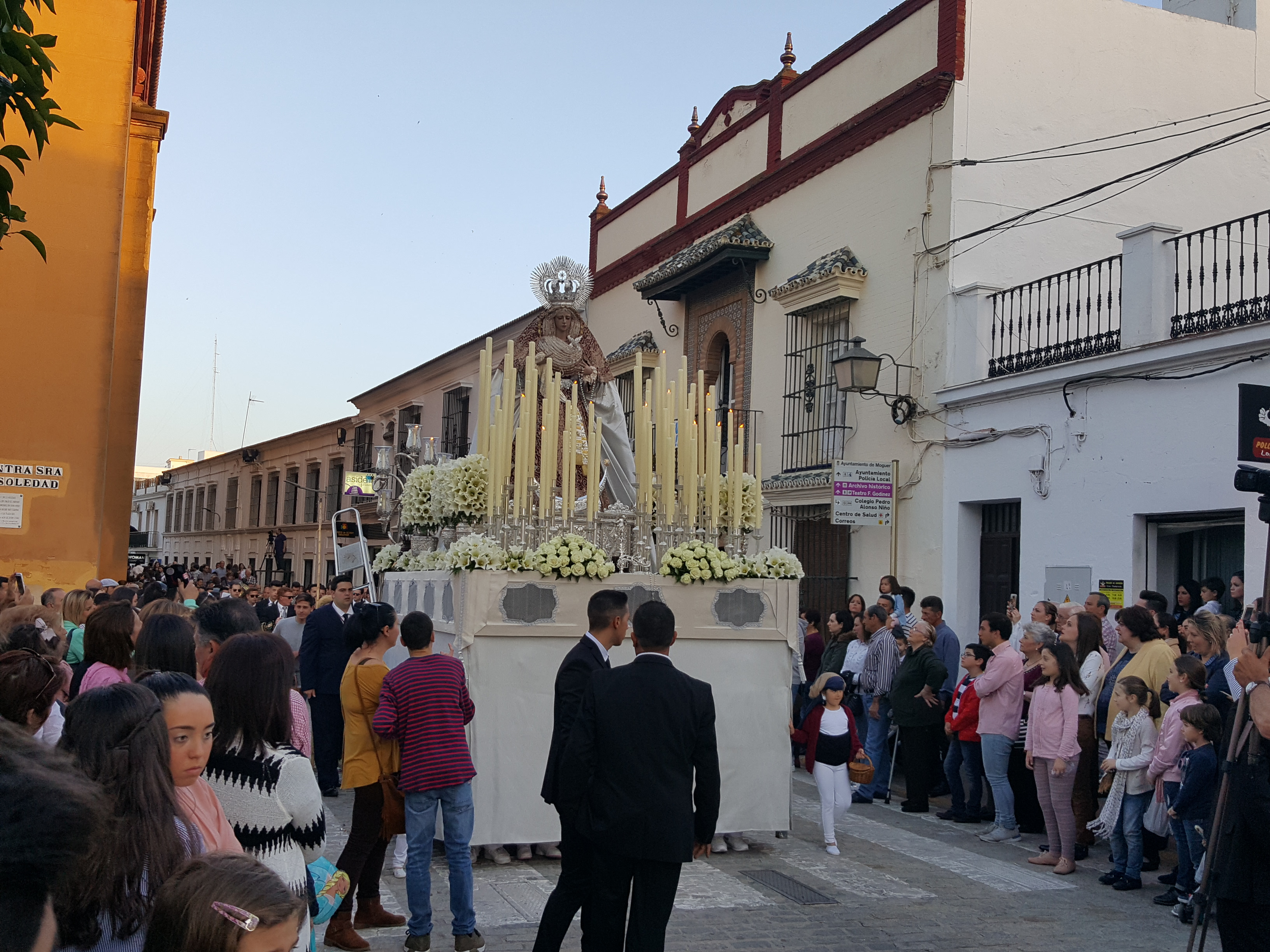 Hermandad del Cristo de los Remedios o del Cautivo. Desfile procesional del Lunes Santo. Vista de la Virgen del Rosario por el casco urbano de Moguer.